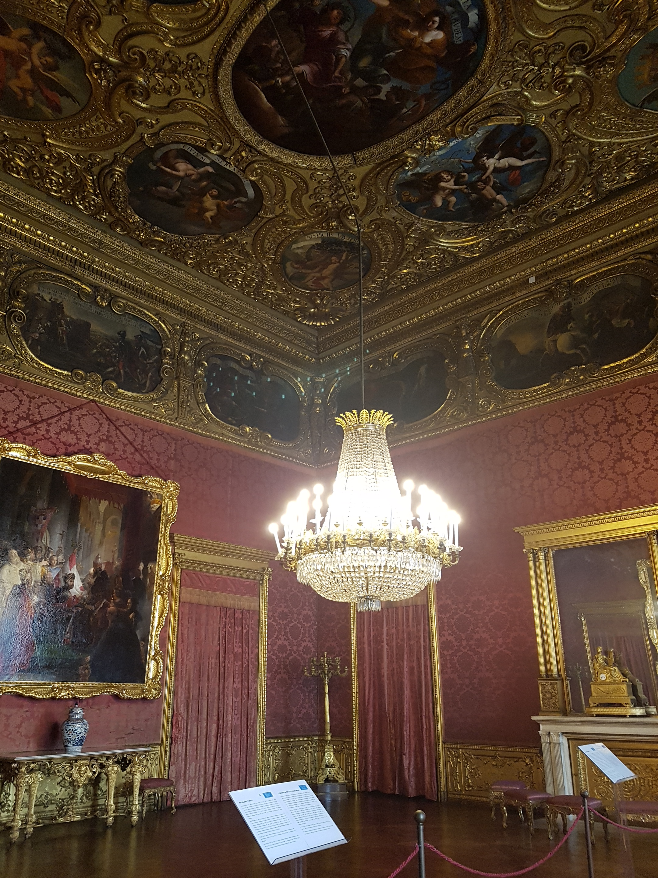 Piano nobile: Sala dei Paggi, Palazzo Reale, Torino